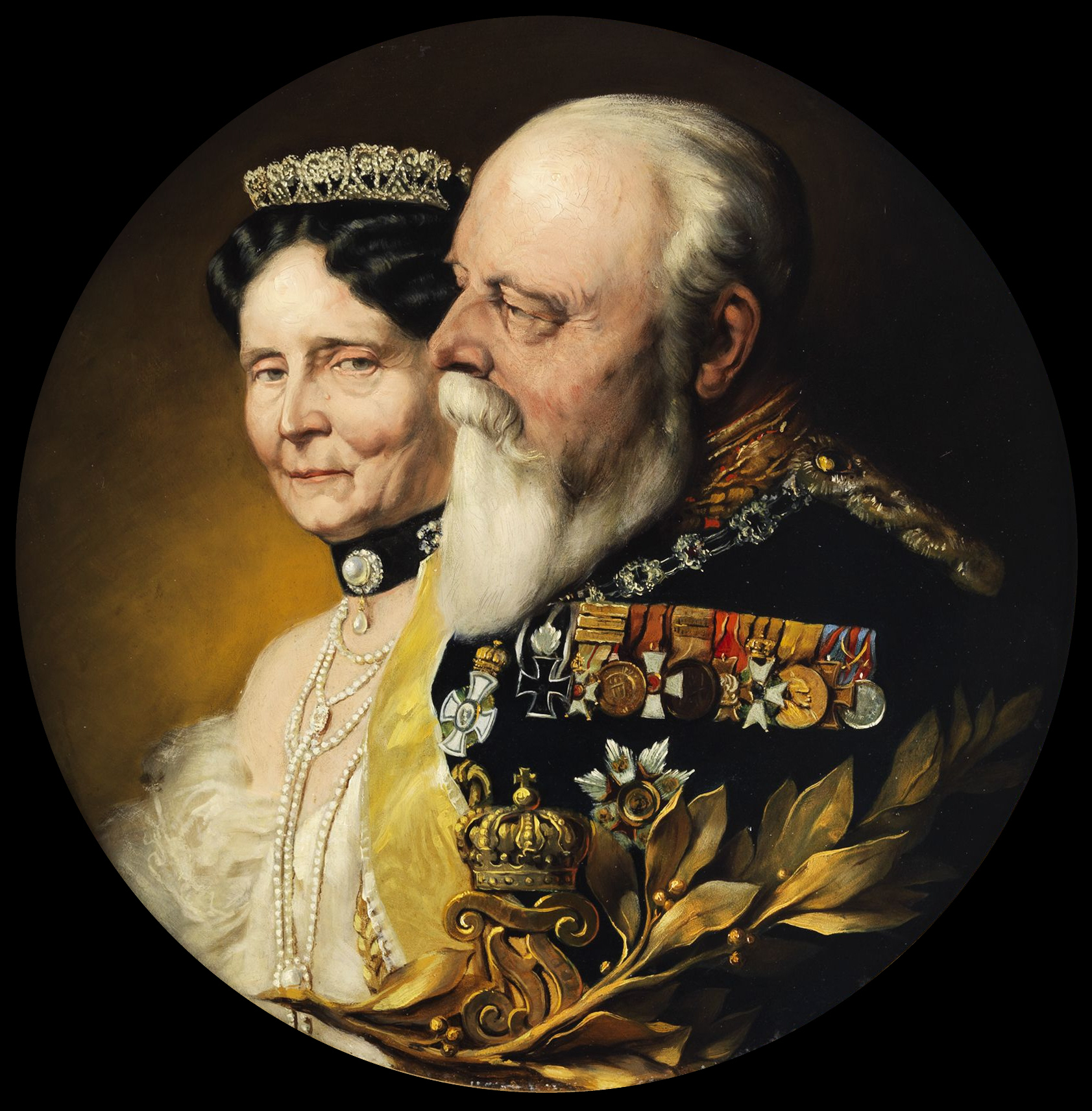 Doppelportrait Friedrich I. von Baden und seiner Gemahlin Luise.